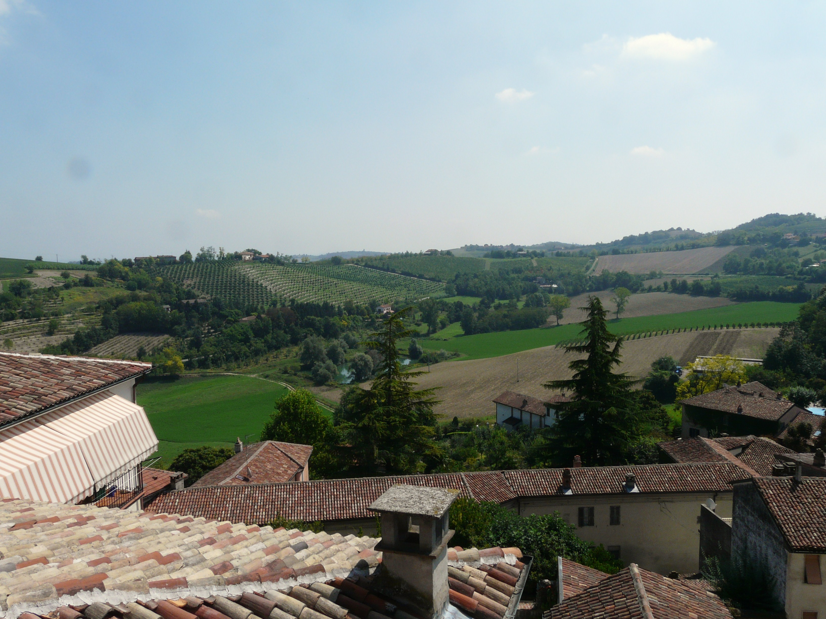 Ozzano Monferrato, Piemonte, Italia